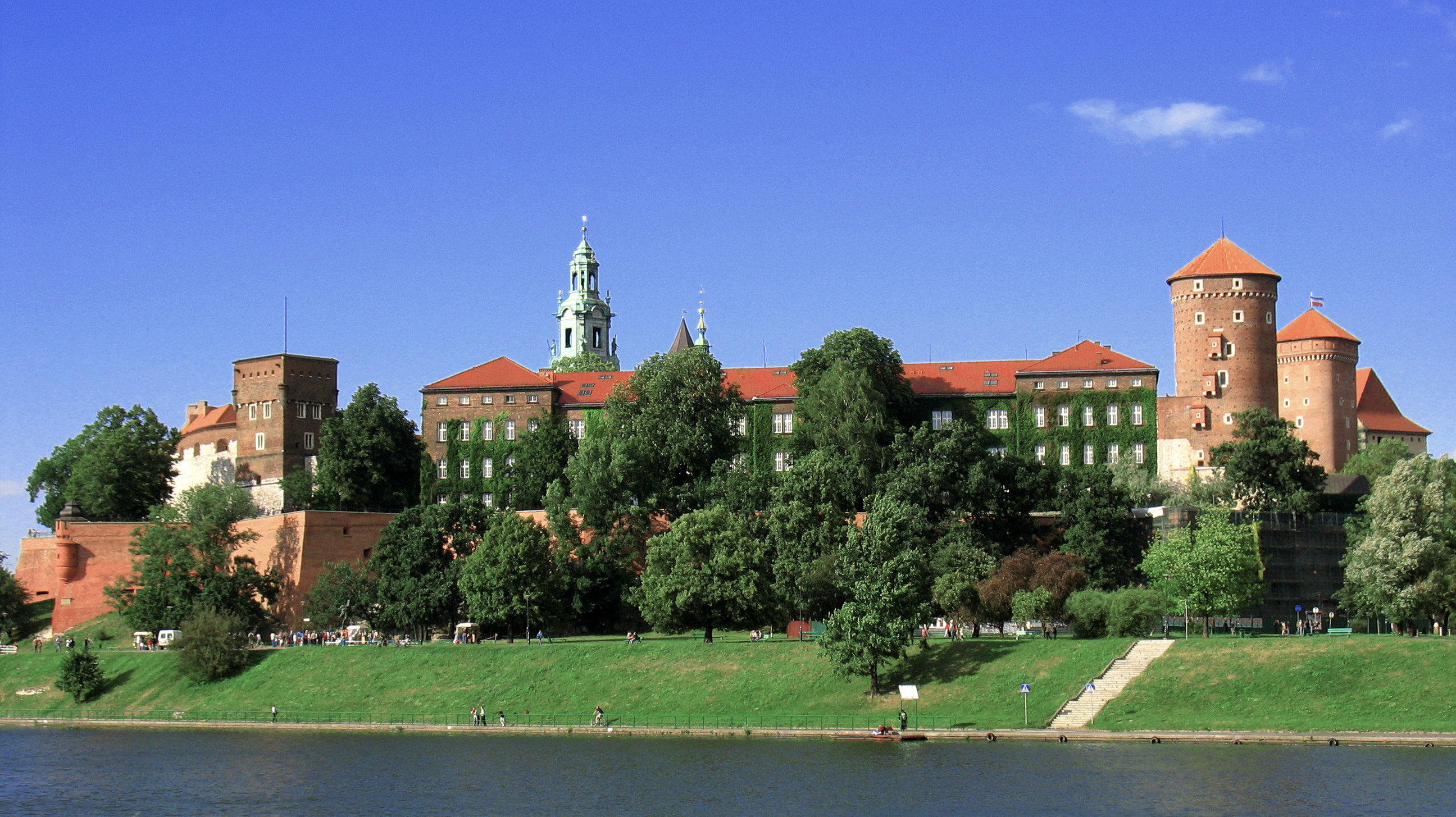 Widok na wzgórze wawelskie od strony Wisły